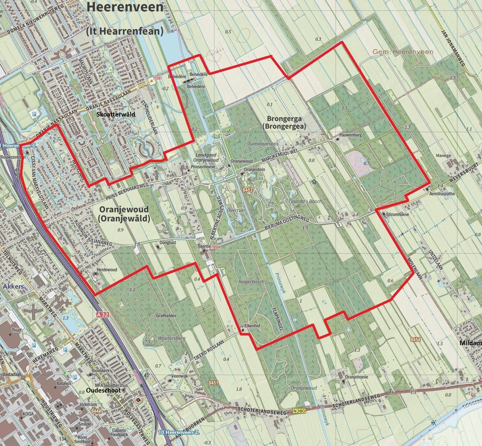 Kaart Oranjewoud